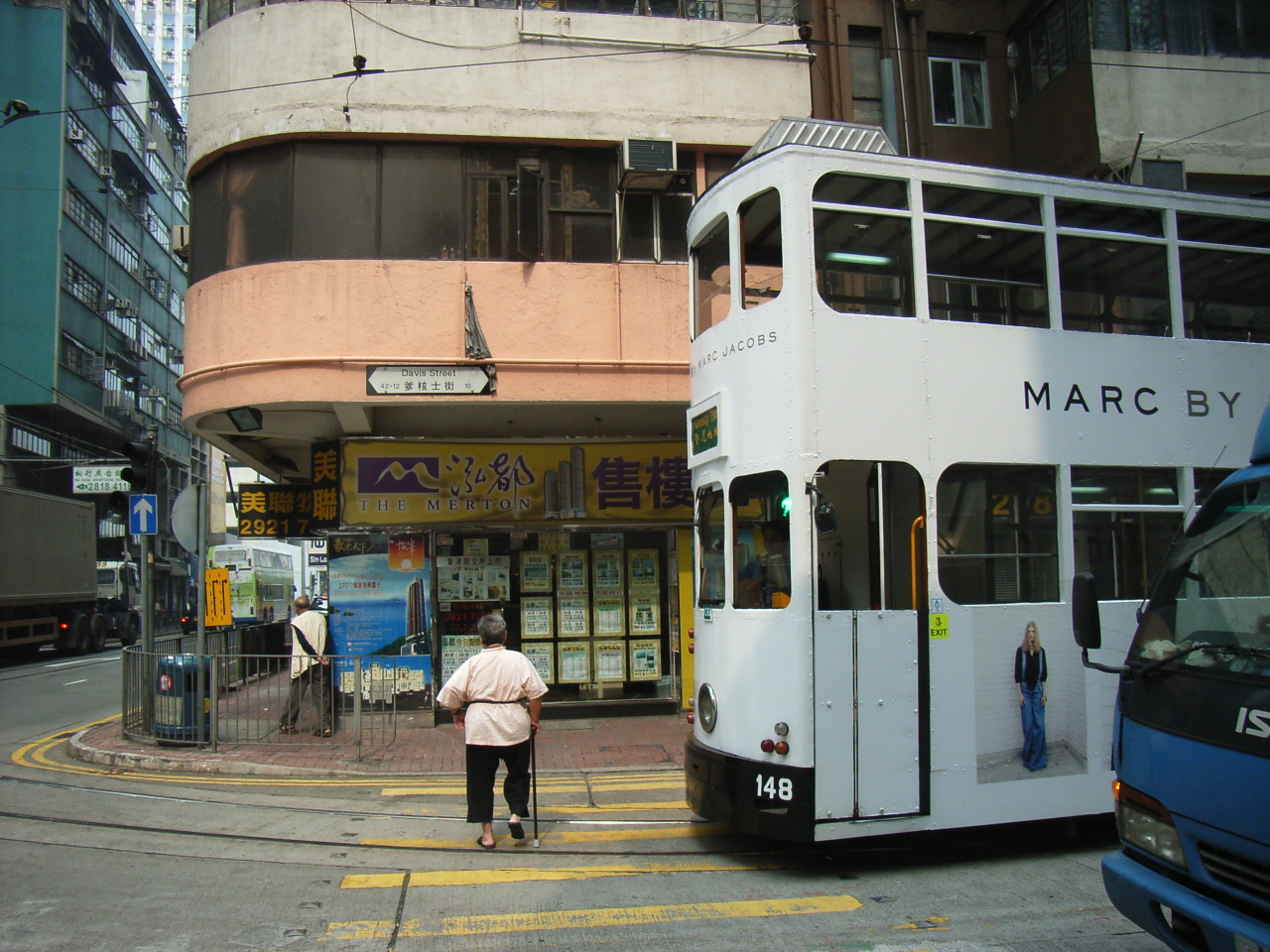 Davis Street, Hong Kong (by MAMA Ken David).